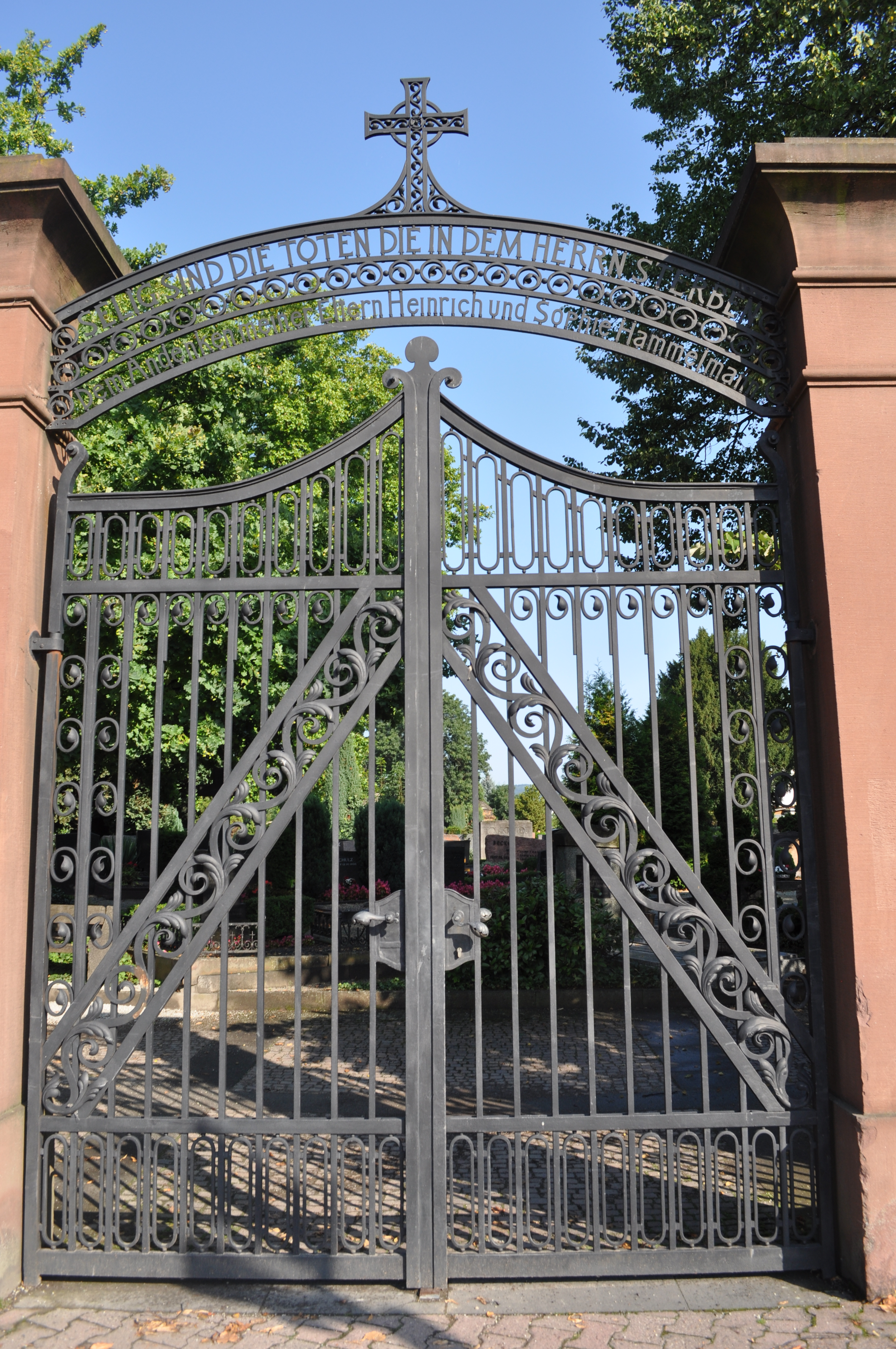 Bad Homburg, Evangelischer Friedhof, Saalburgstraße, Tor